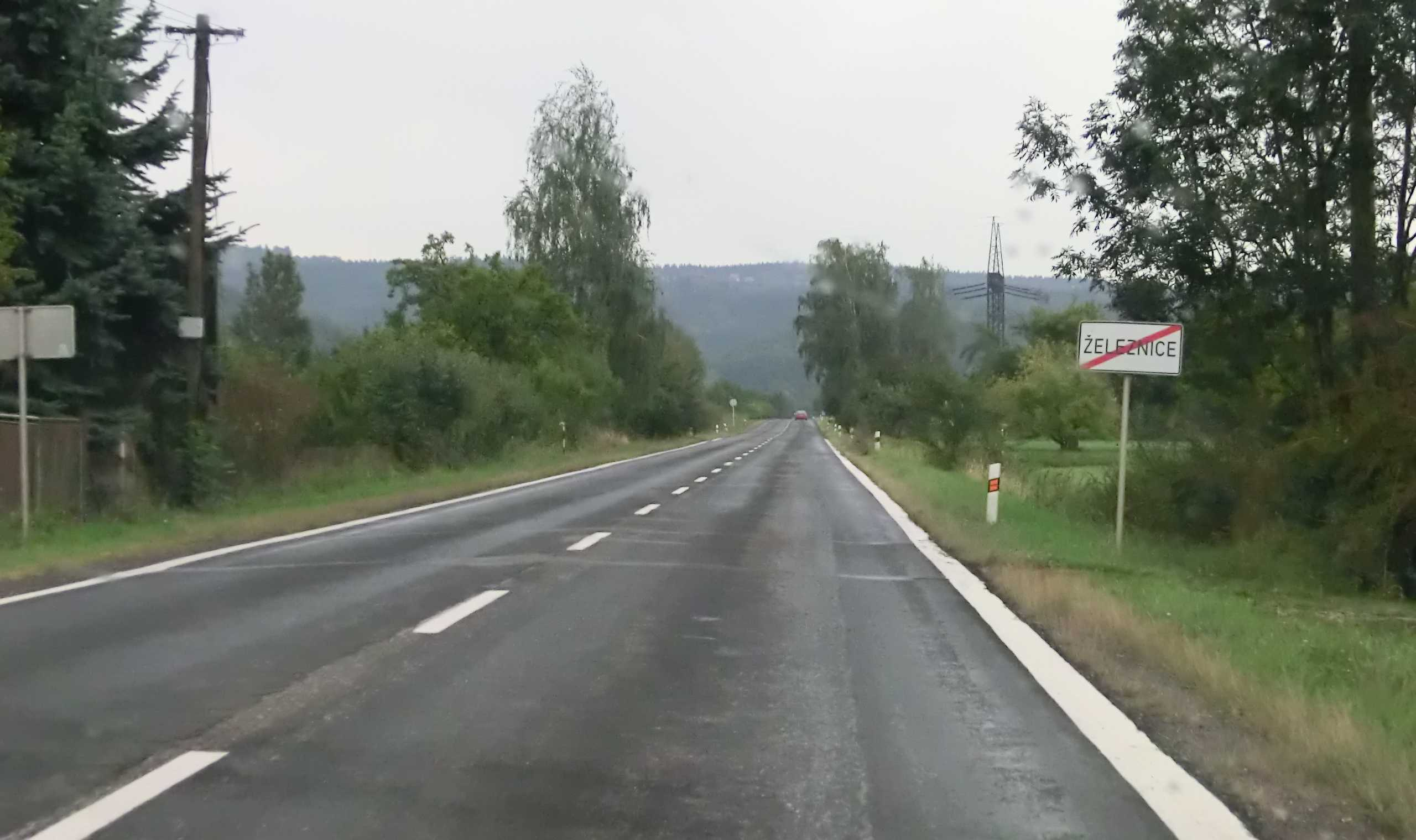 Opravená část silnice opouštějící městečko Železnice směrem na Lomnici n.P.